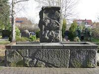 Goethebrunnenn (Ilmenau): Schöpfbrunnen und Relief